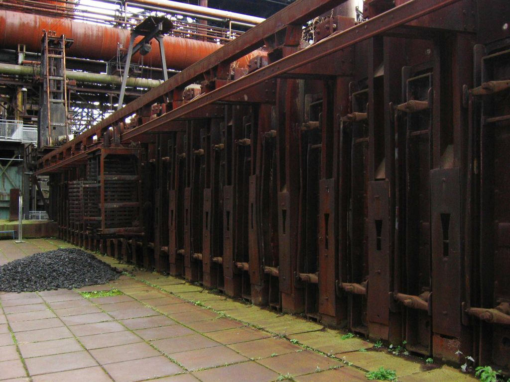 Kokerei der Stahlhütte Völklingen